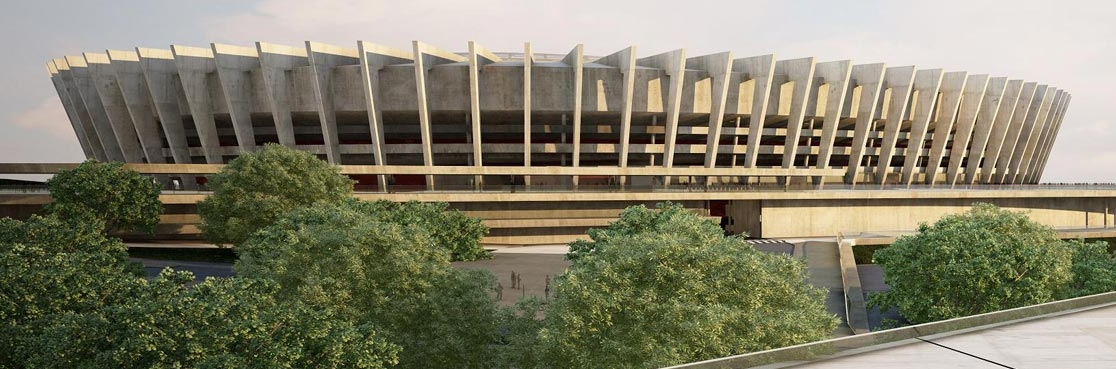 Estádio Governador Magalhães Pinto (Mineirão) em 2014.